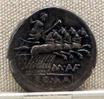 Palazzo Massimo alle Terme